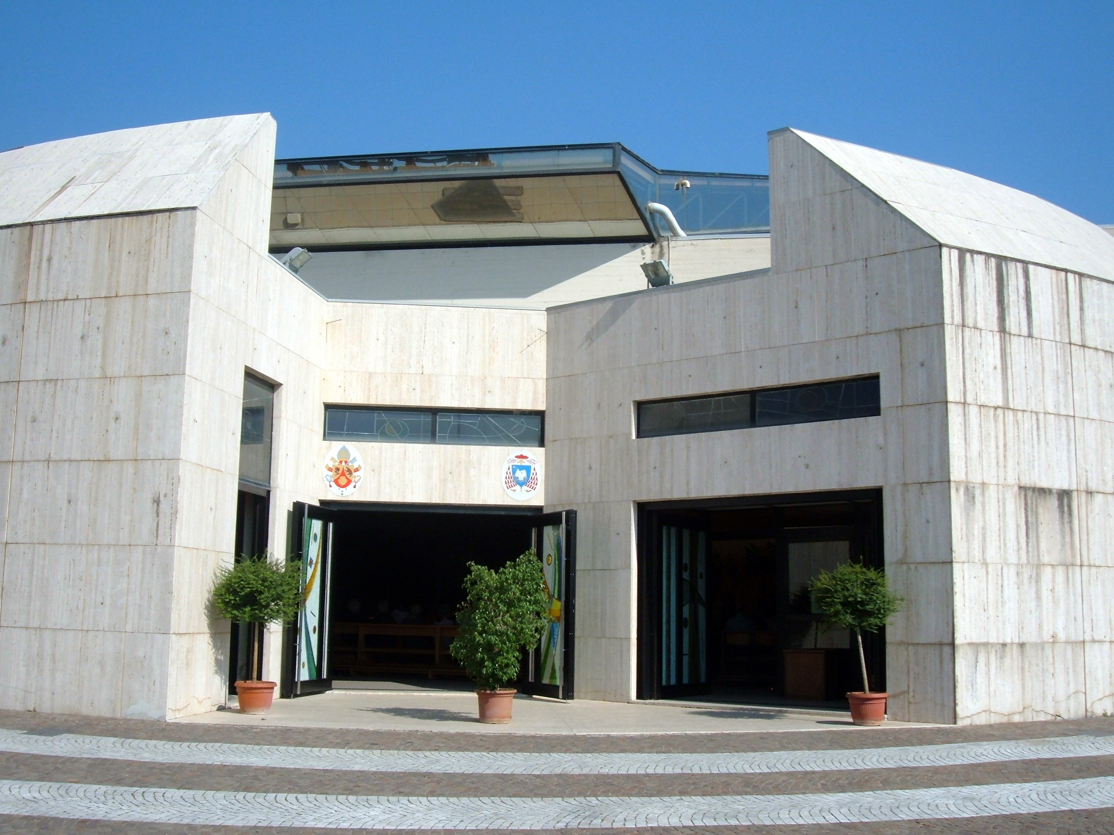 Chiesa dei Santi Aquila e Priscilla, a Roma, nel quartiere Portuense.